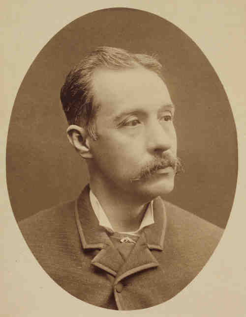 Retrato de Nazario Espinosa Araujo